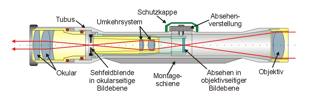 Prinzipieller Aufbau eines Zielfernrohres ohne Fokussierung, mit Absehen in der Objektivbildebene. Zeichnung: Joachim Baecker 2005